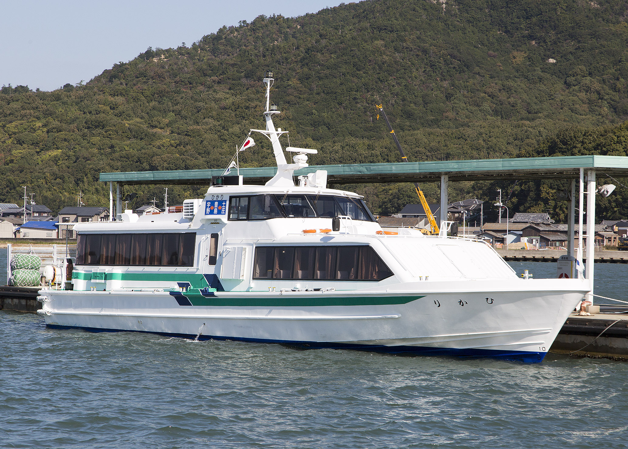 小豆島豊島フェリー ひかり 土庄港にて